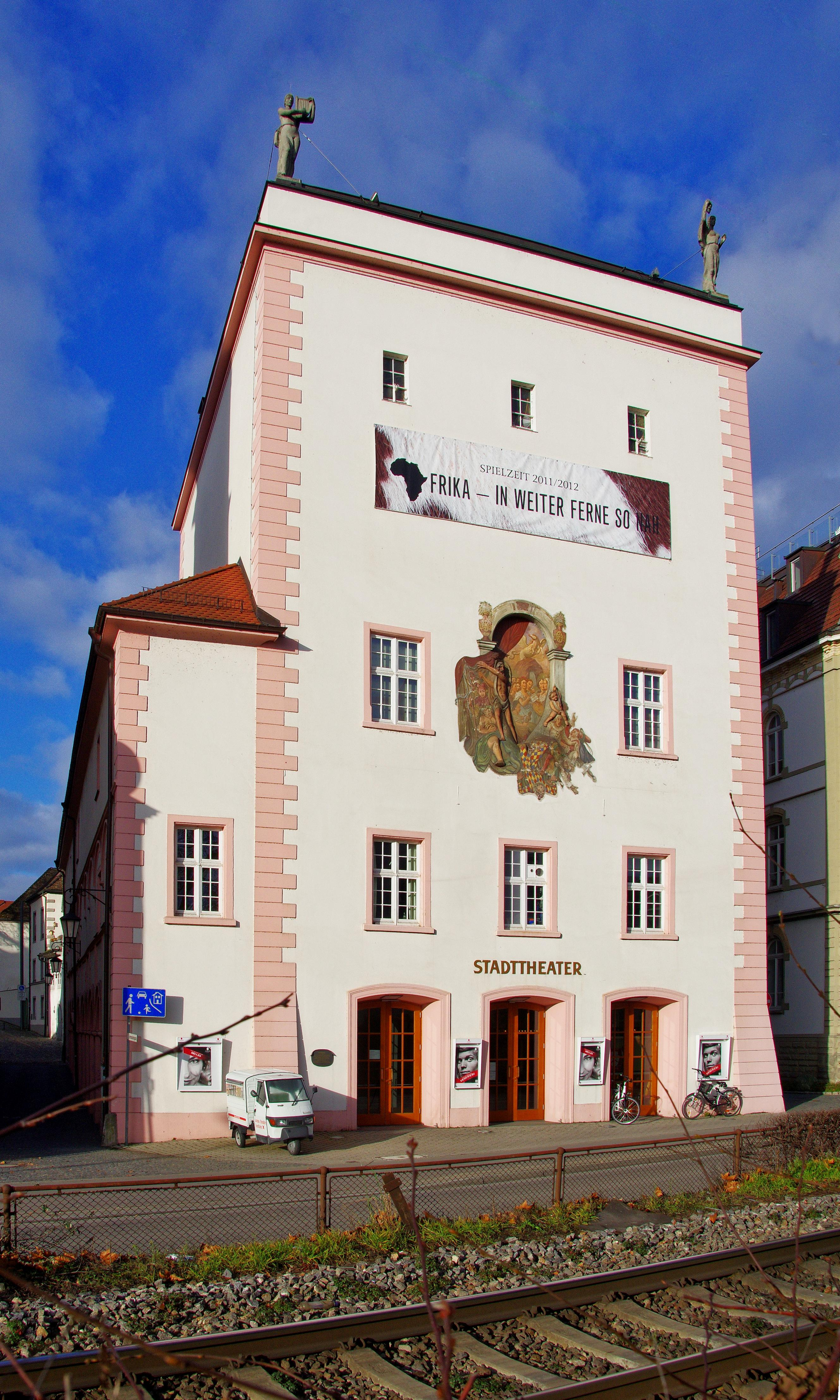 Das Stadttheater